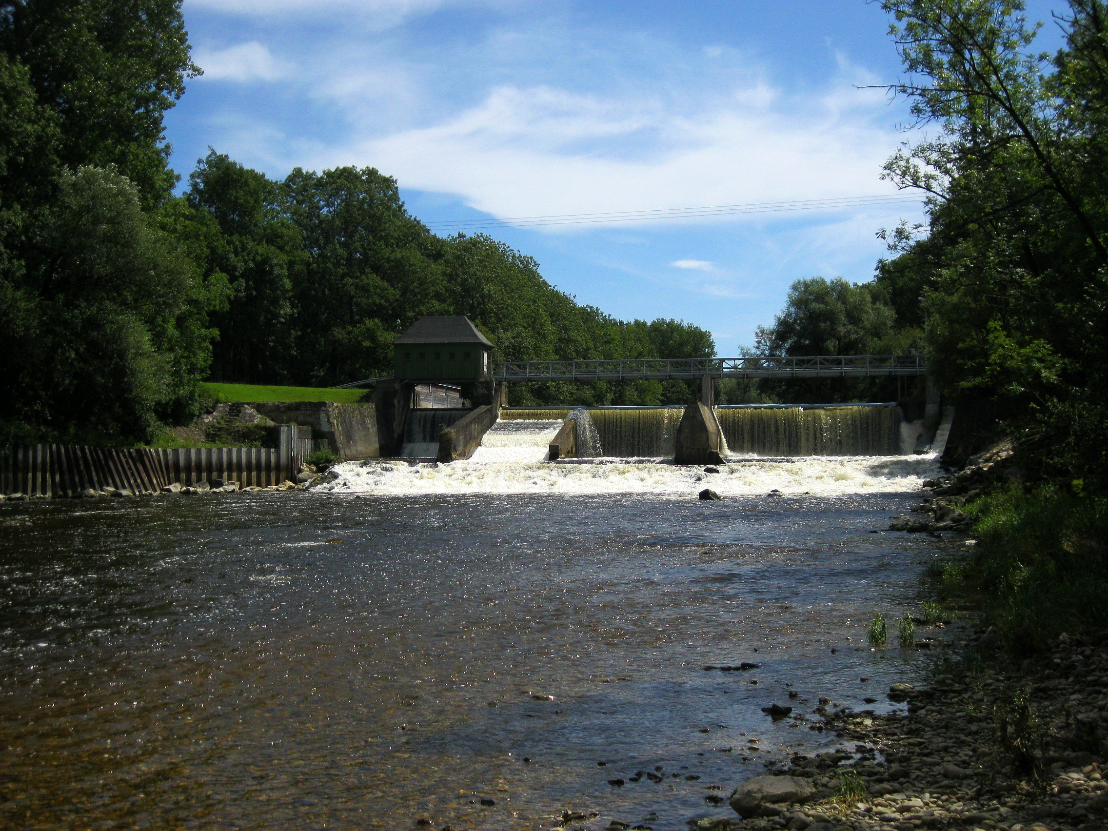 Wehr an der Wertach bei Irsingen, Ableitung des Mühlbachs